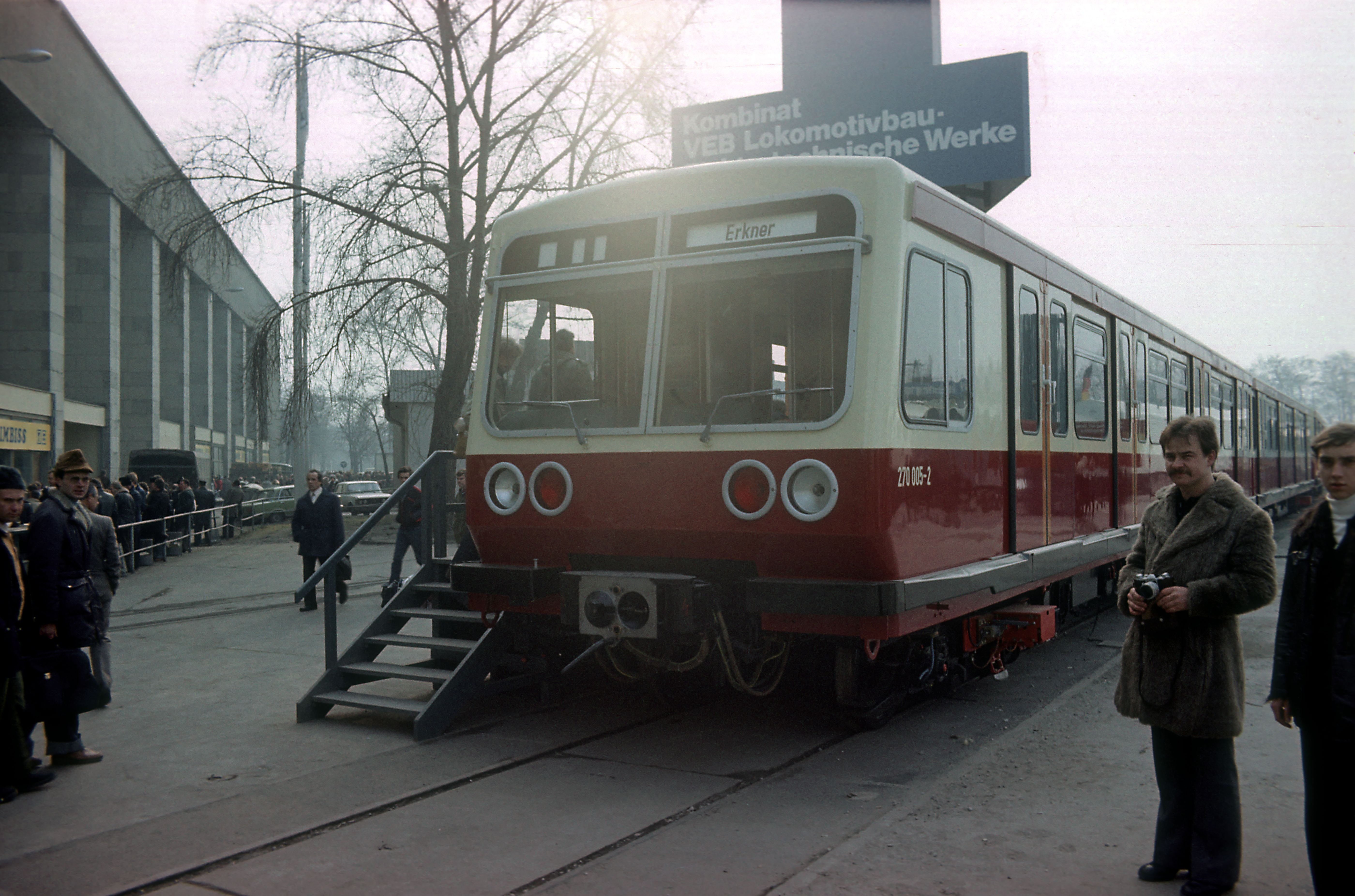 Neubautriebzug für die S-Bahn Berlin, Prototyp auf der Leipziger Frühjahrsmesse 1980